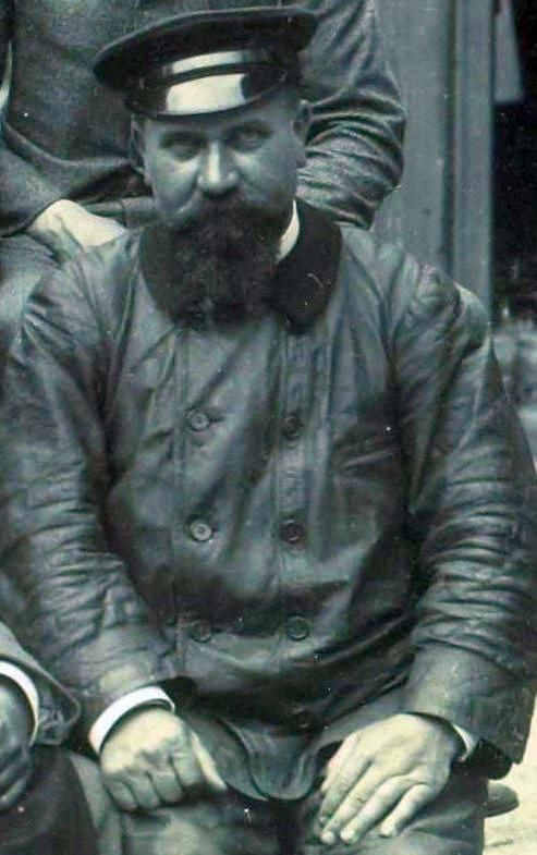 [Collection Jules Beau. Photographie sportive] : T. 10. Année 1899 / Jules Beau : F. 7v. [Course automobile du Tour de France, 1899]